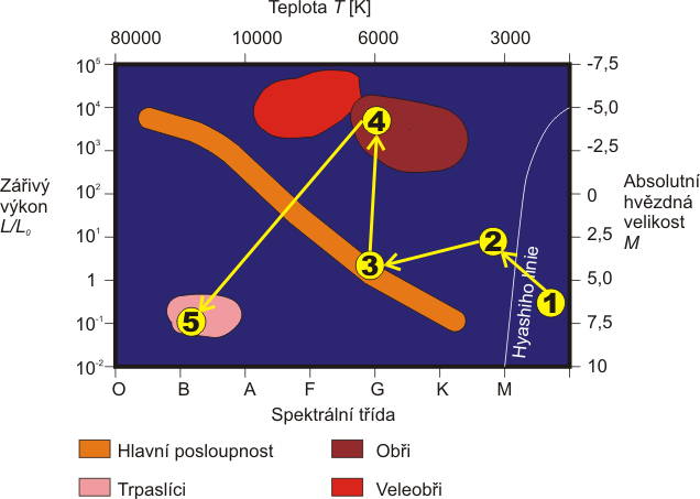 Hertzsprungův-Russellův diagram: vývoj hvězdy o hmotnosti 1 MS